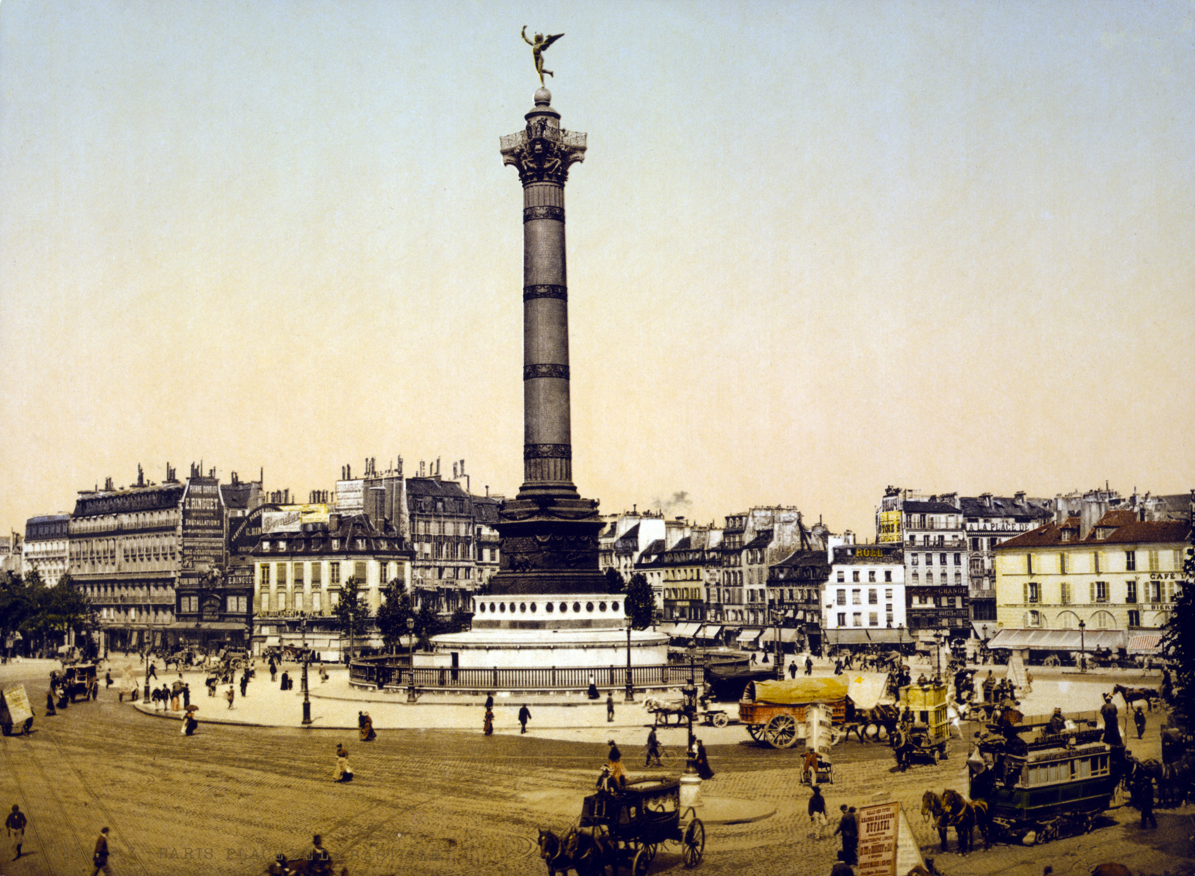 Place de la Bastille, Paris, France.